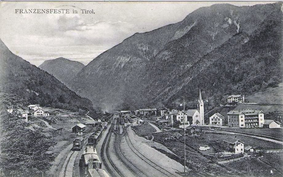 Bahnhof Franzensfeste